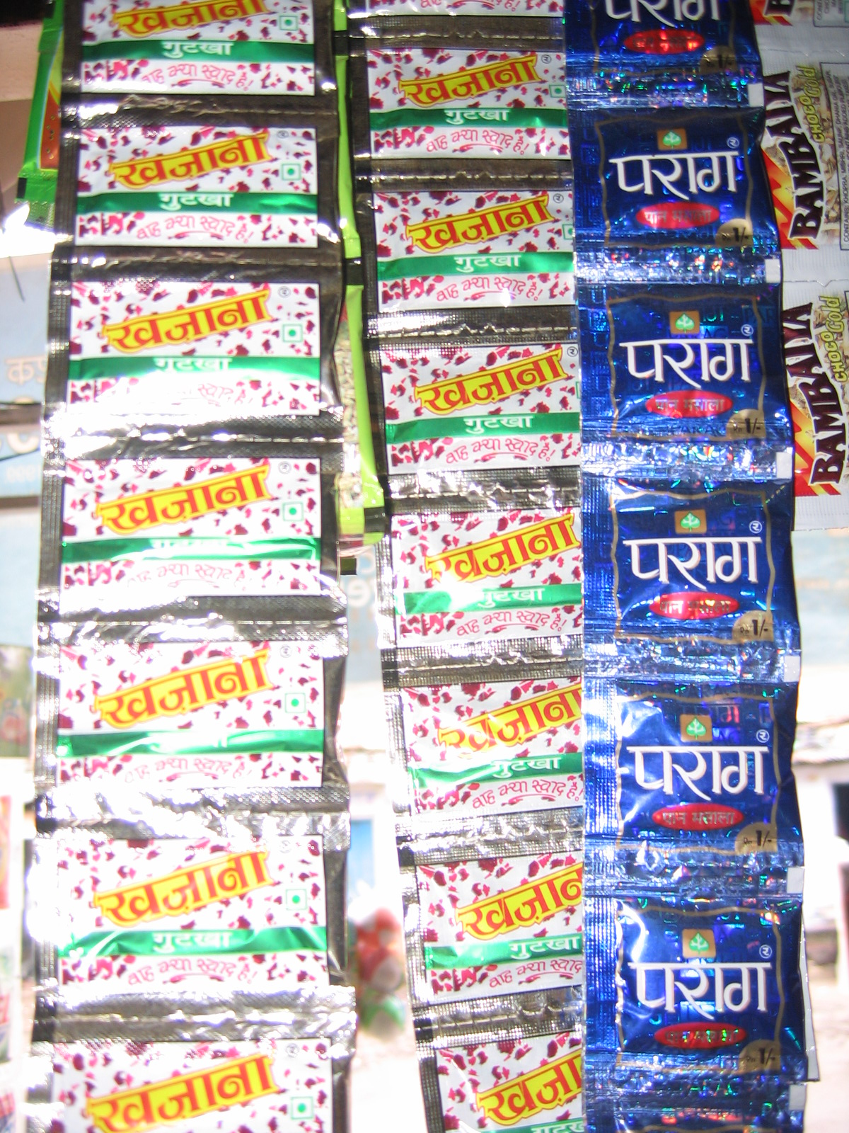 Gutka pouches